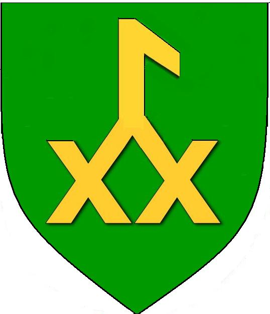 Wappen des Peter Schaffer, Bürger zu Bern, Schultheiss zu Büren, (1515 / 1516) (Wappen der Familie Schäfer); Blasonierung: In Grün eine goldene Hausmarke, bestehend aus Göpelfußschaft mit hinter Kopfabstrebe und vorderer rechter wie hinterer linker Fußkreuzstrebe.